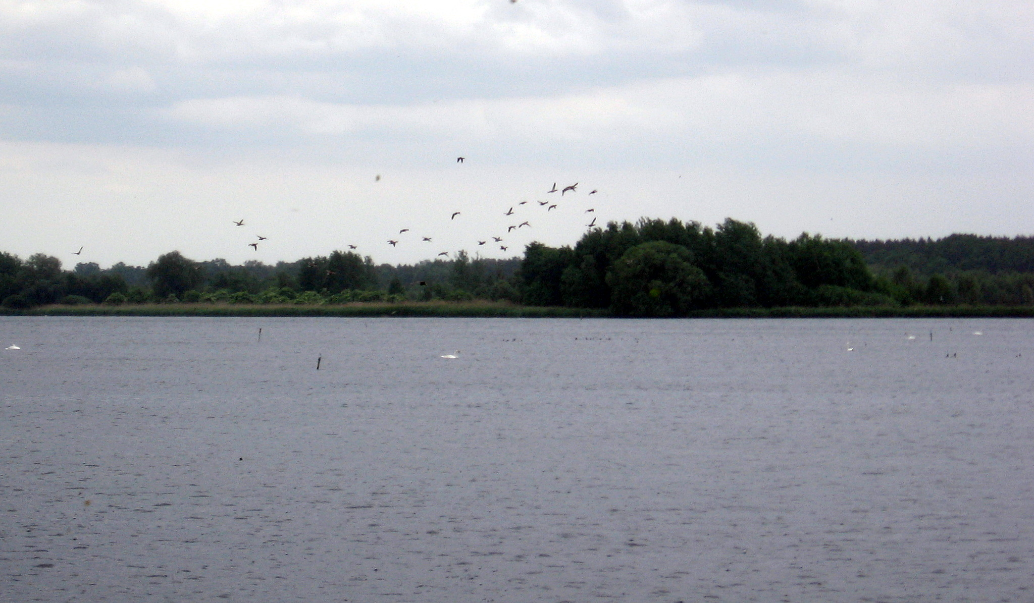 Poland, Milicz - Ponds of Milicz (Stawy Milickie) Staw Jamnik